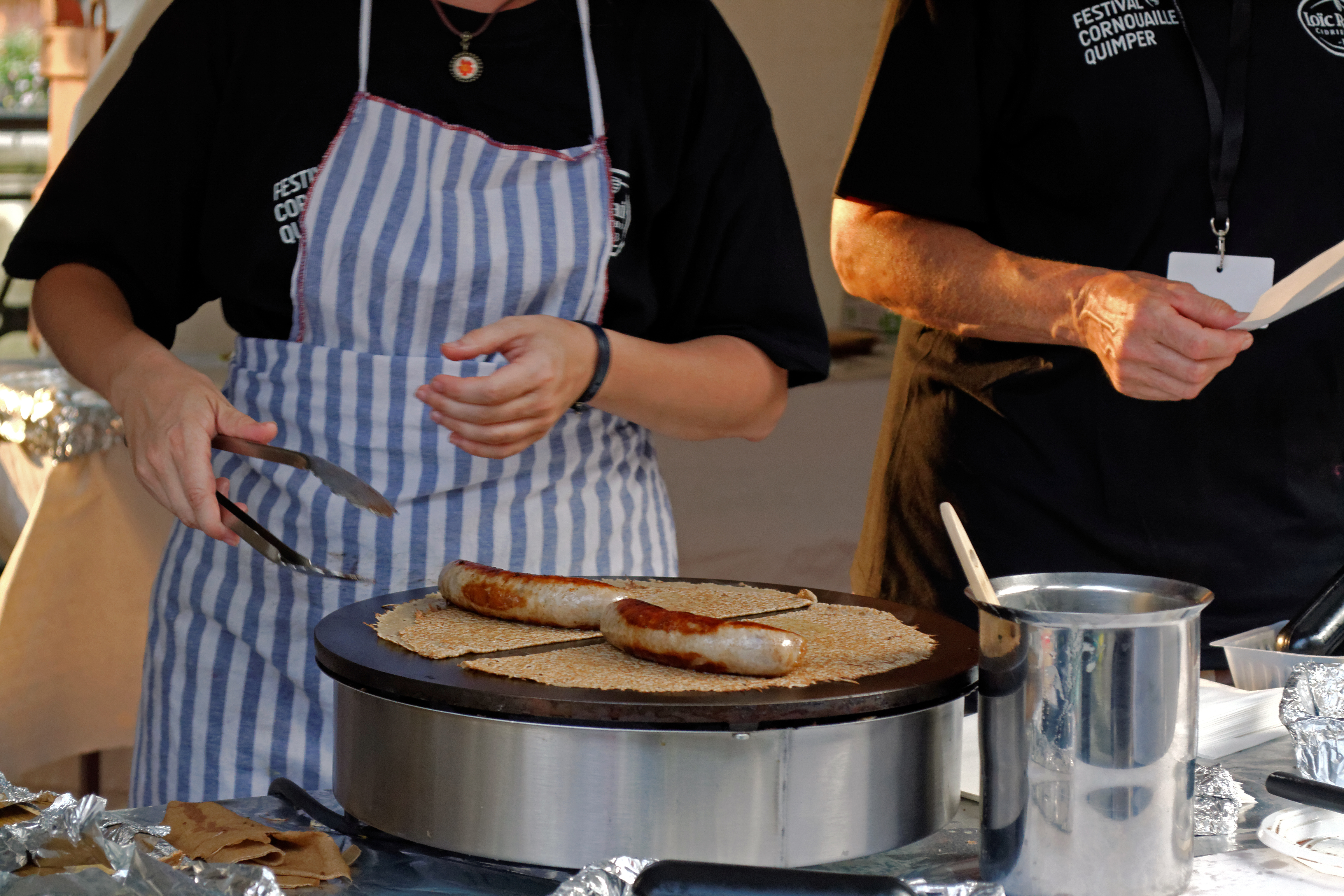 Préparation d'une galette-saucisse (Blé Noir-Hénaff) au stand restauration rapide du festival de Cornouaille 2014.